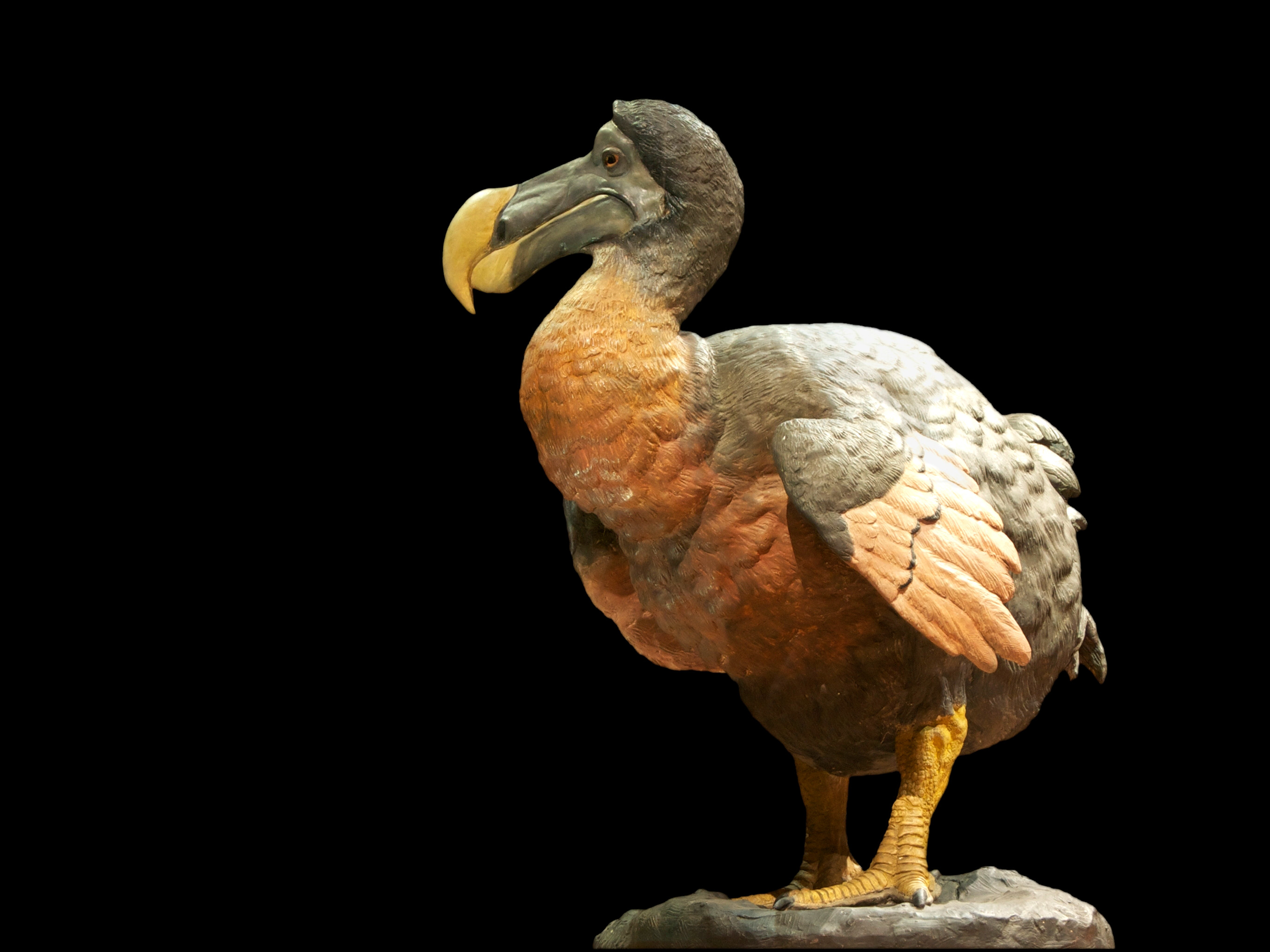 Ptak dodo